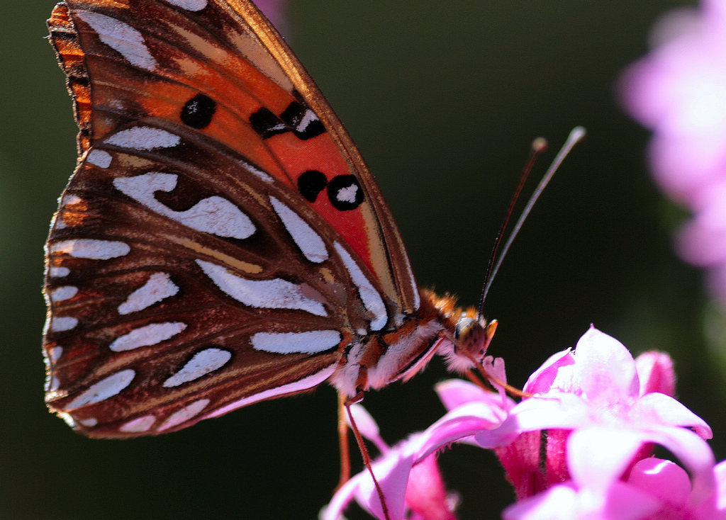 Agraulis vanillae